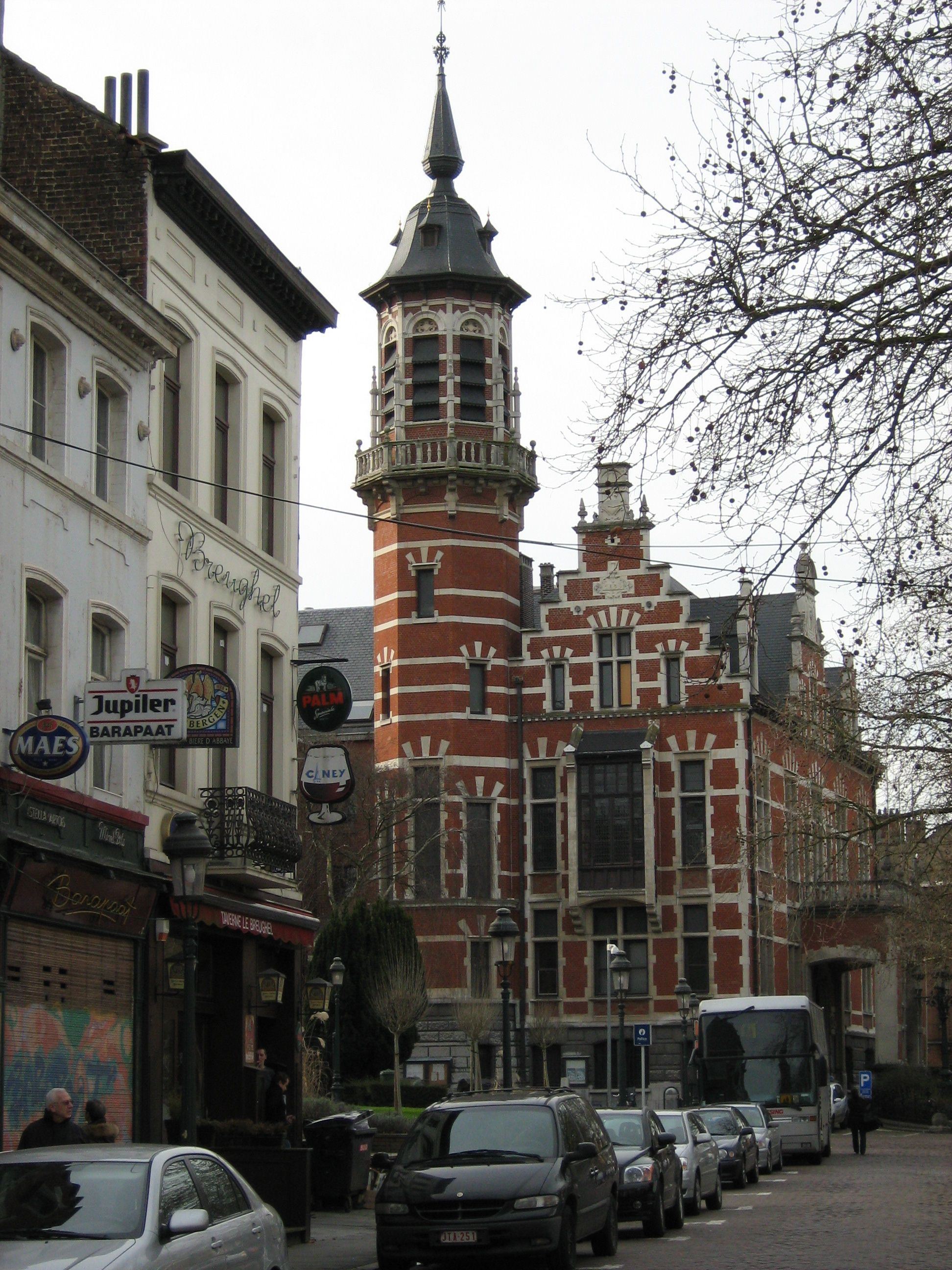 Politiekantoor op het Kardinaal Mercierplein te Jette (Brussel, België)